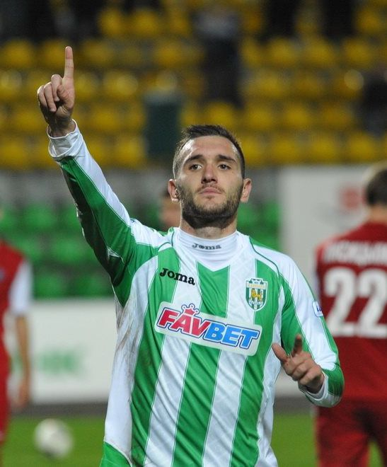 Лукас Перес - іспанський футболіст. Під час зустрічі "Карпати" - "Кривбас" він забив три голи.